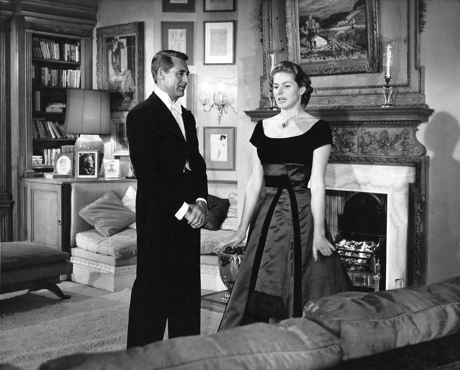 Cary Grant & Ingrid Bergman taken for film Indiscreet (1958). See also film still. No copyright notice.